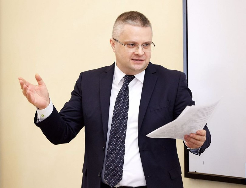 Роман Романов